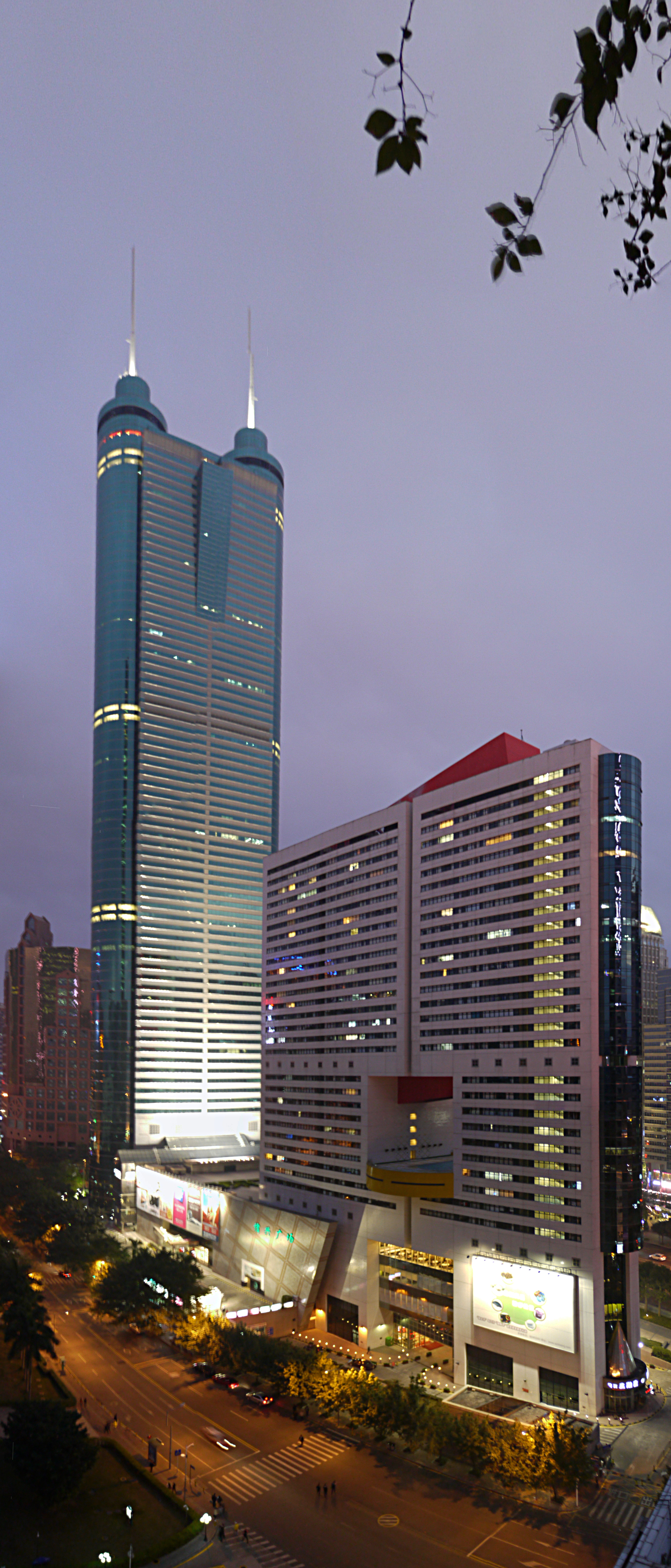 中文（香港）: 地王大廈外觀